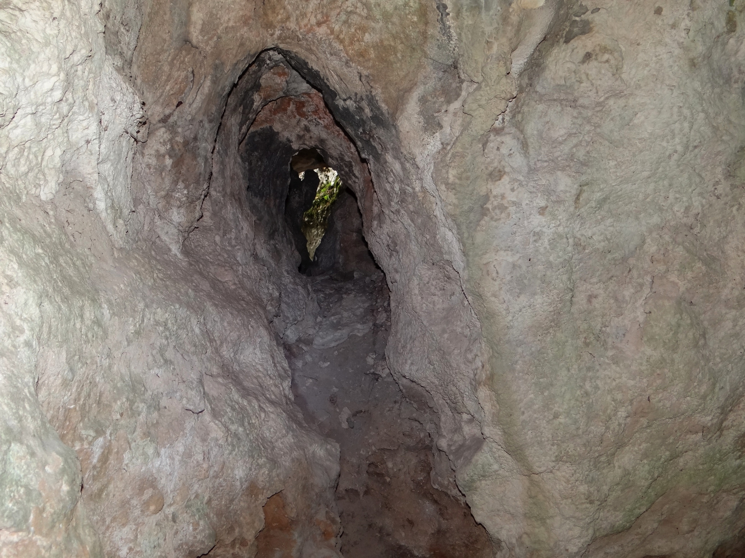 Schronisko w Krużganku na Górze Popielowej w na Wyżynie Częstochowskiej